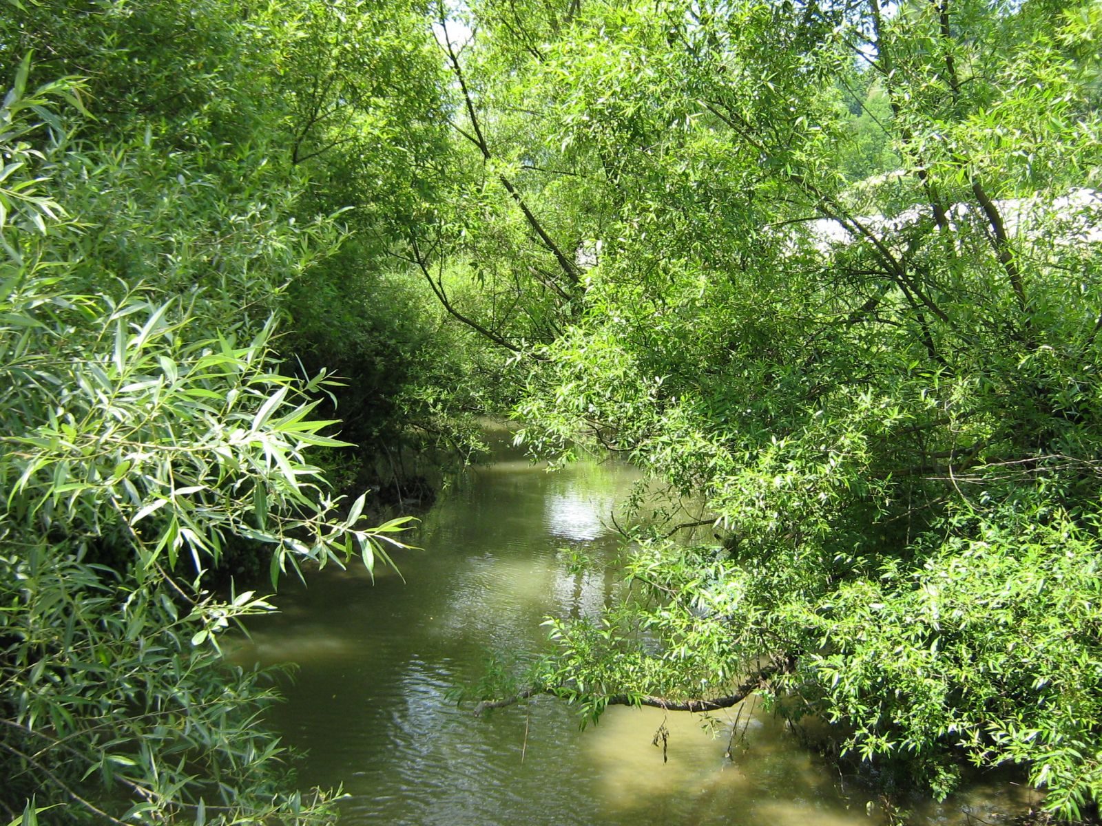 Apa care curge prin Agries